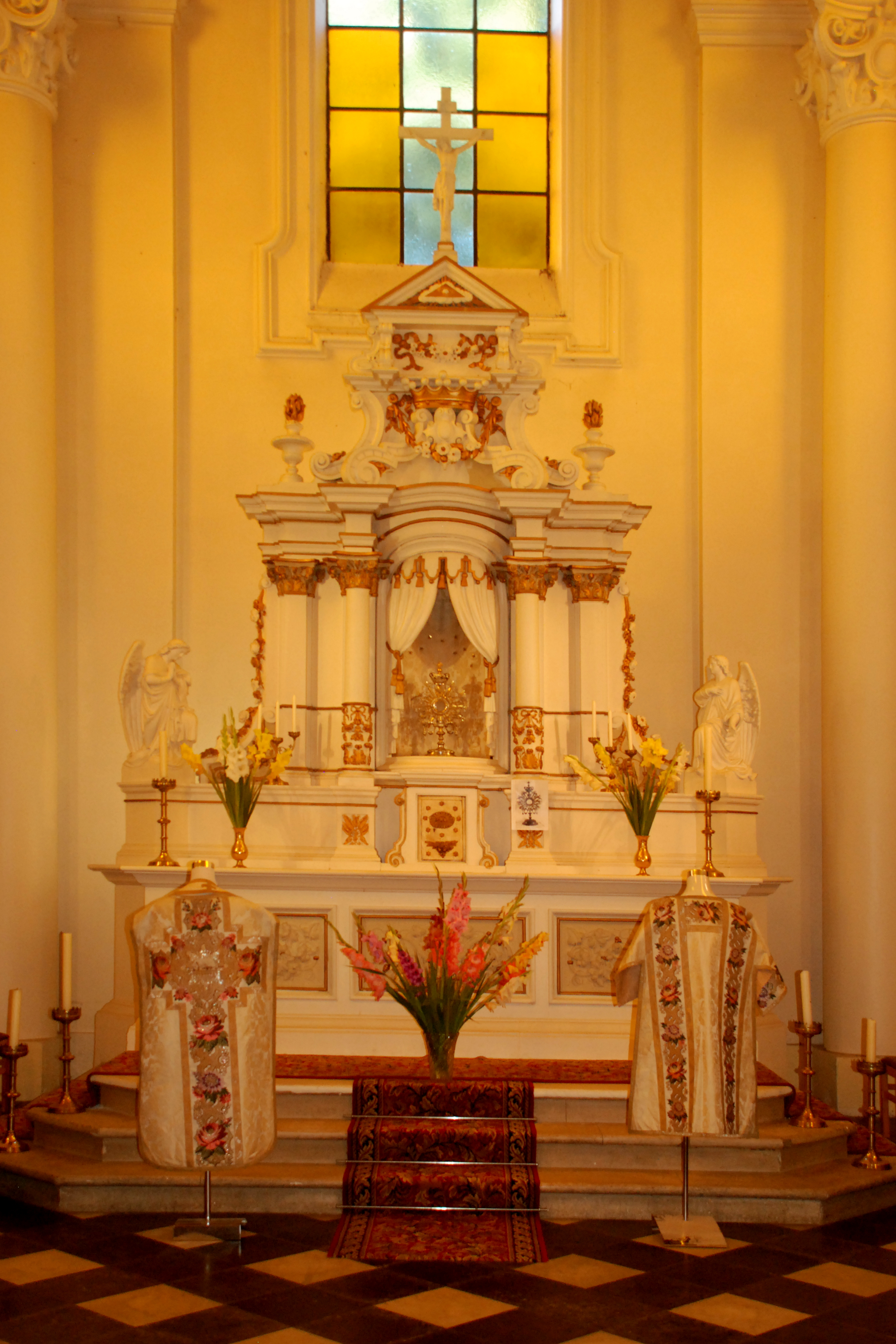 Belgique - Brabant wallon - Chastre - Église Sainte-Gertrude de Gentinnes